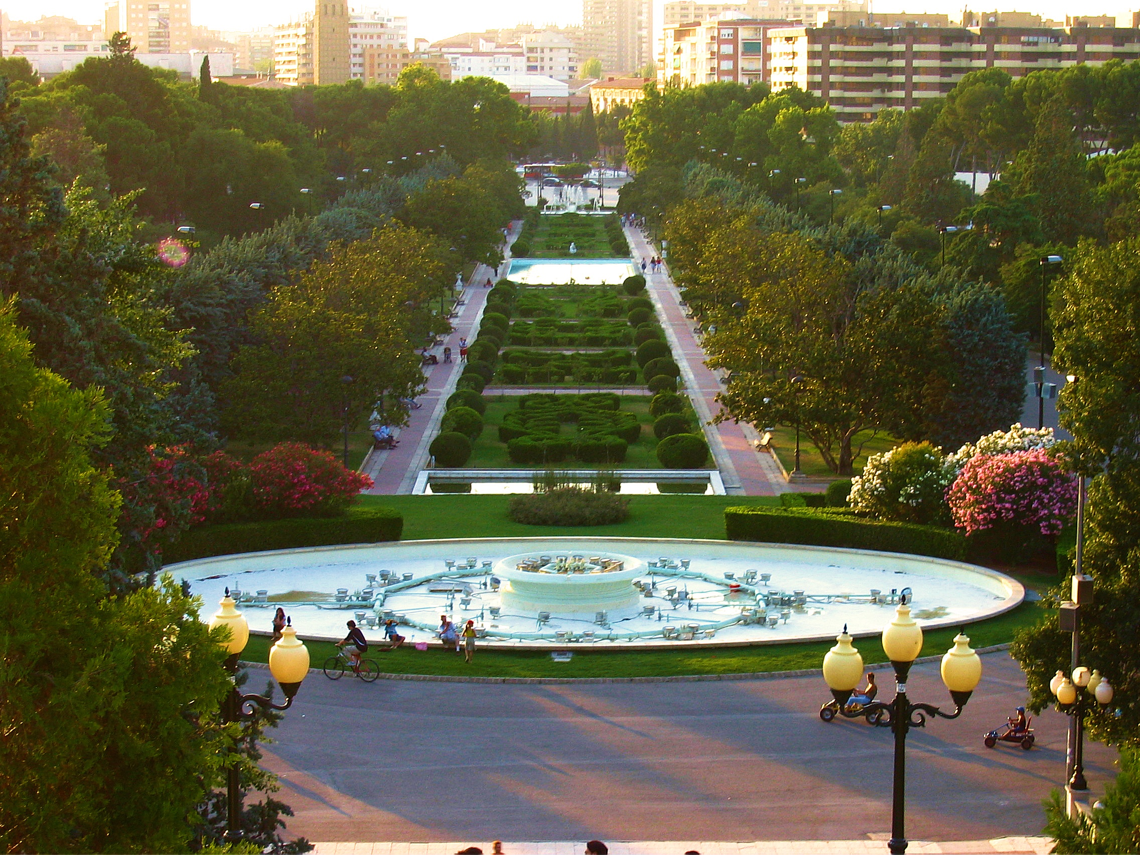 Parque Jose Antonio Labordeta de Zaragoza.